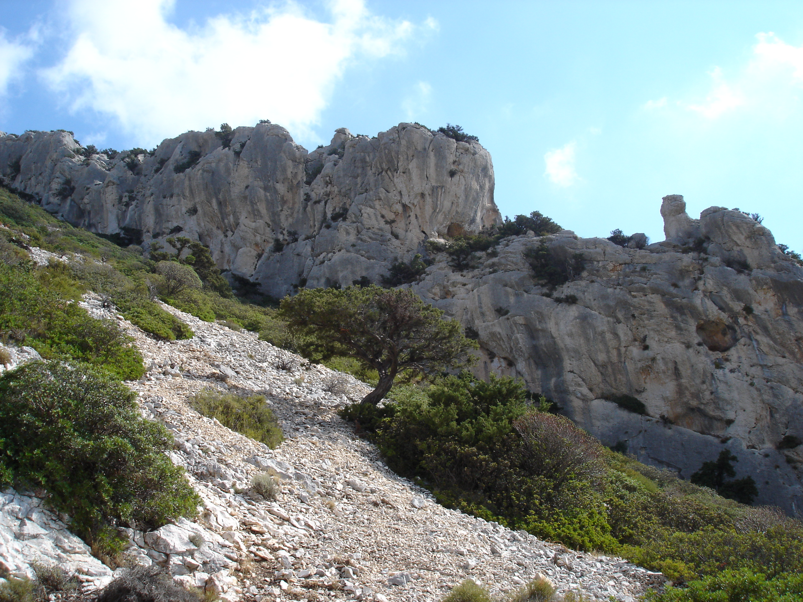 spli Tiscali